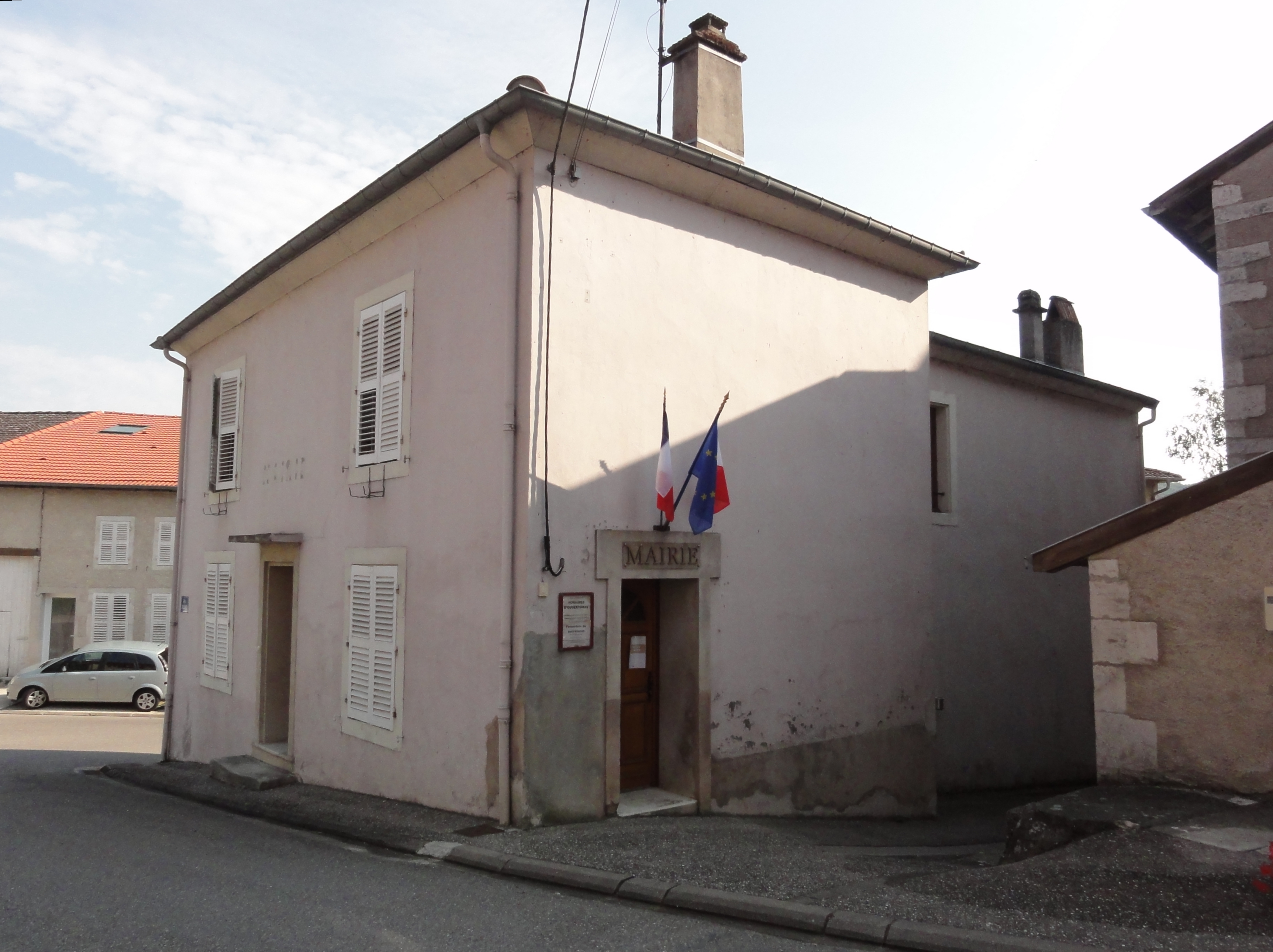 Laneuveville-derrière-Foug (Meurthe-et-M.) mairie